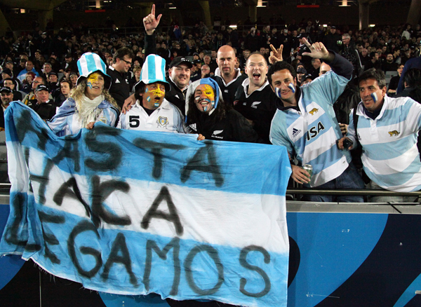 COUPE DU MONDE DE RUGBY 2011 NOUVELLE ZELANDE ARGENTINE